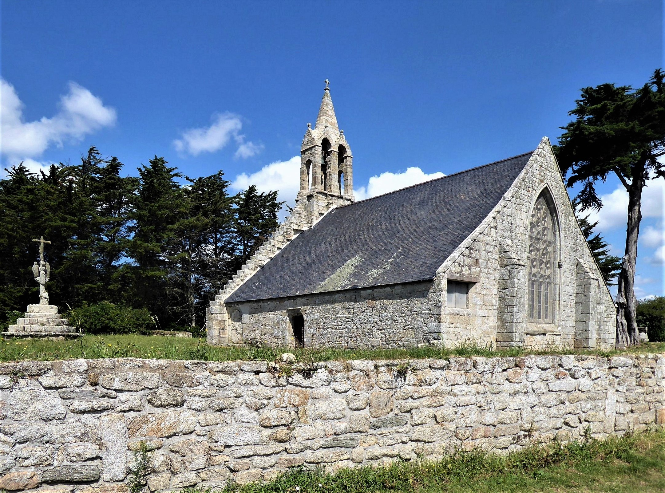 Chapelle Saint-Budoc de Beuzec-Cap-Caval